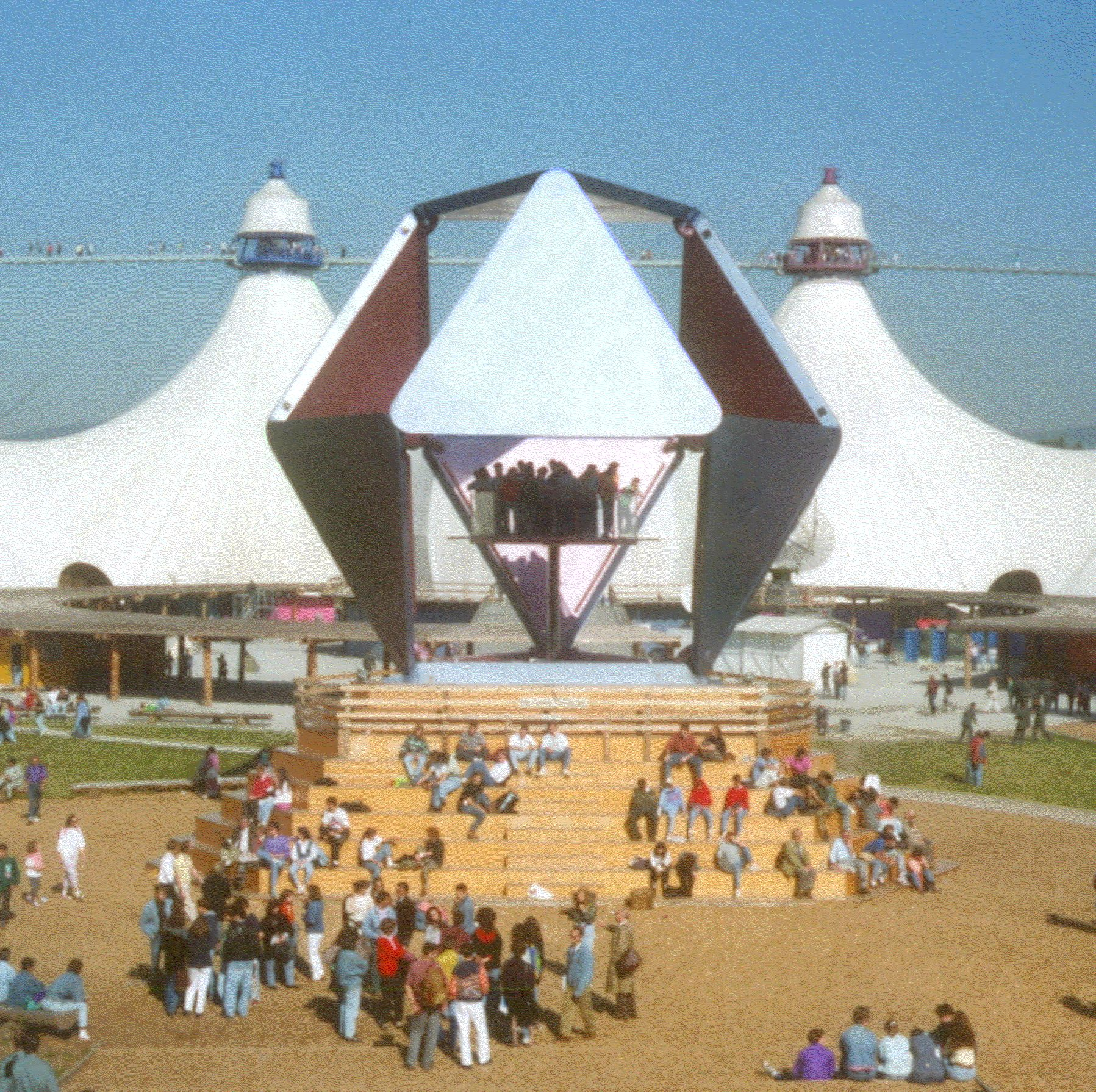 Heureka (Ausstellung) 1991 in Zürich: "Heurekapolyeder"